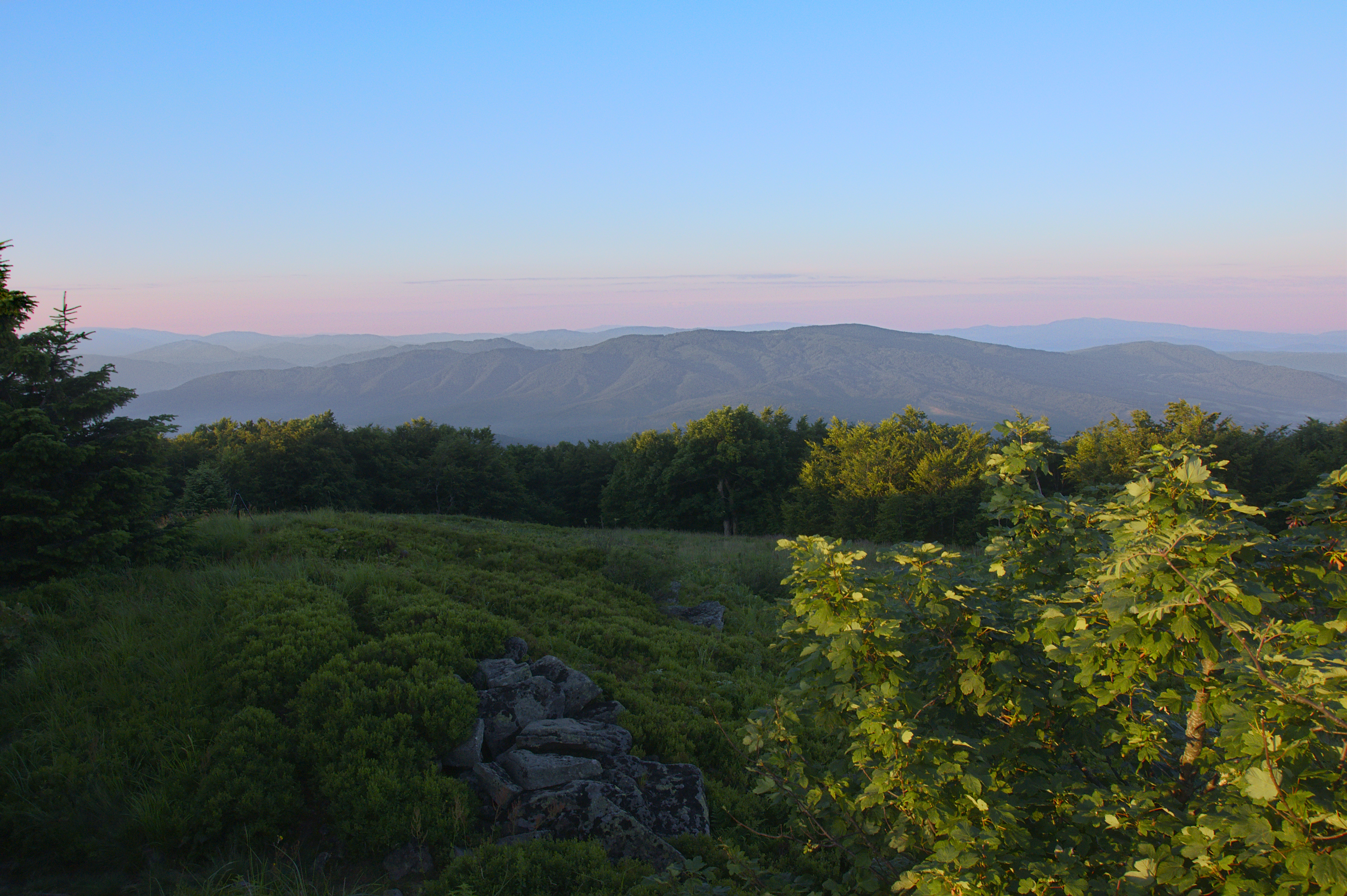 Východ slunce z Kamenné lúky, Národní park Poloniny